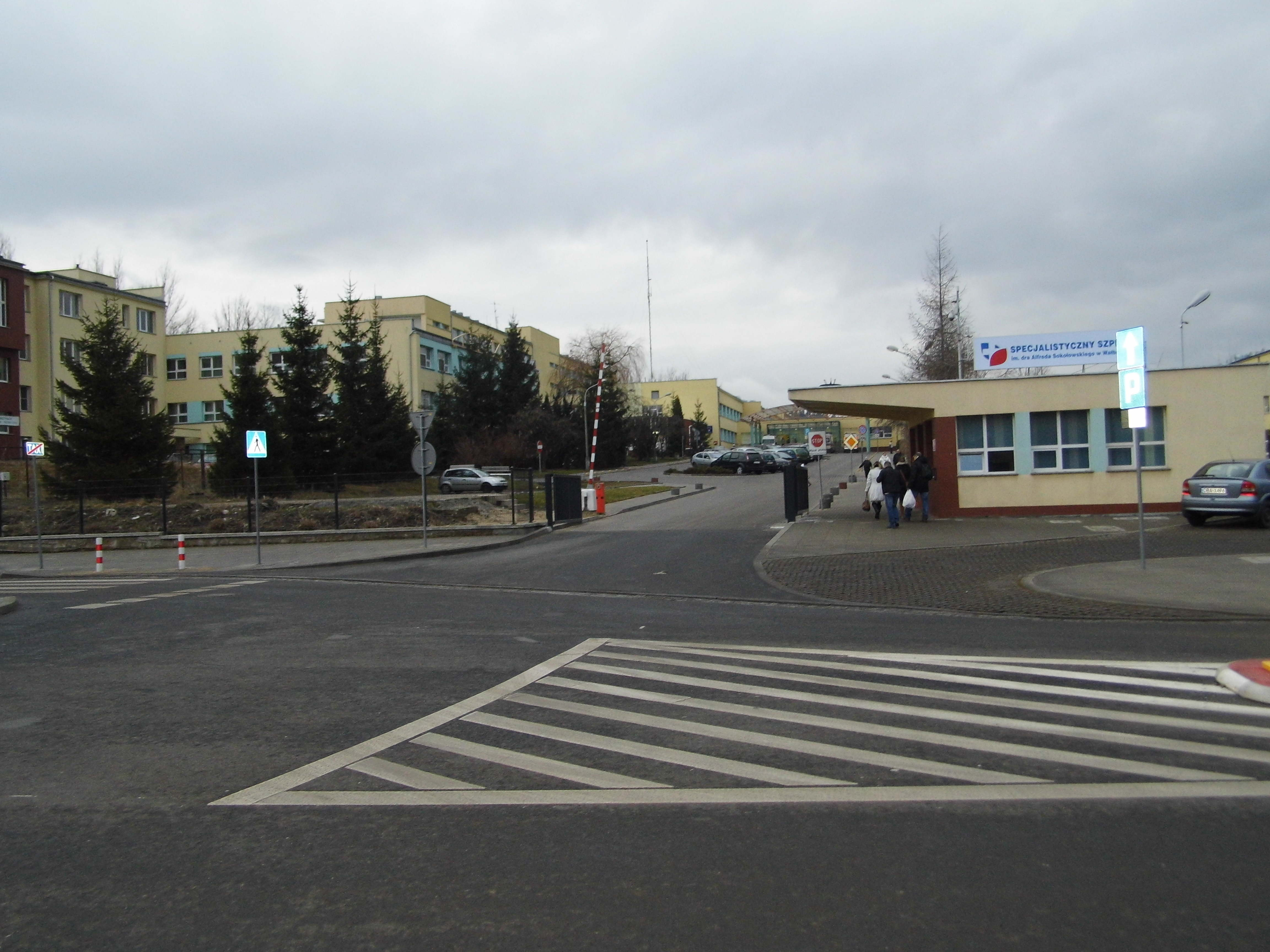 Szpital im dr Sokołowskiego w Wałbrzychu